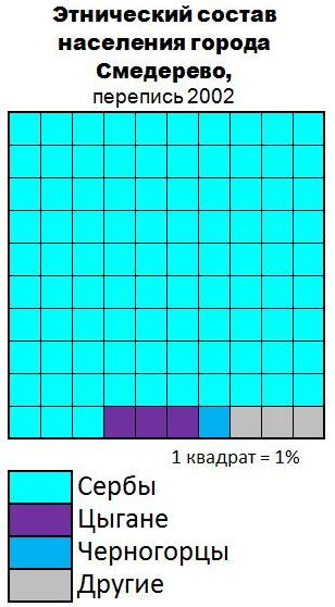 Этнический состав населения города Смедерево (Сербия)